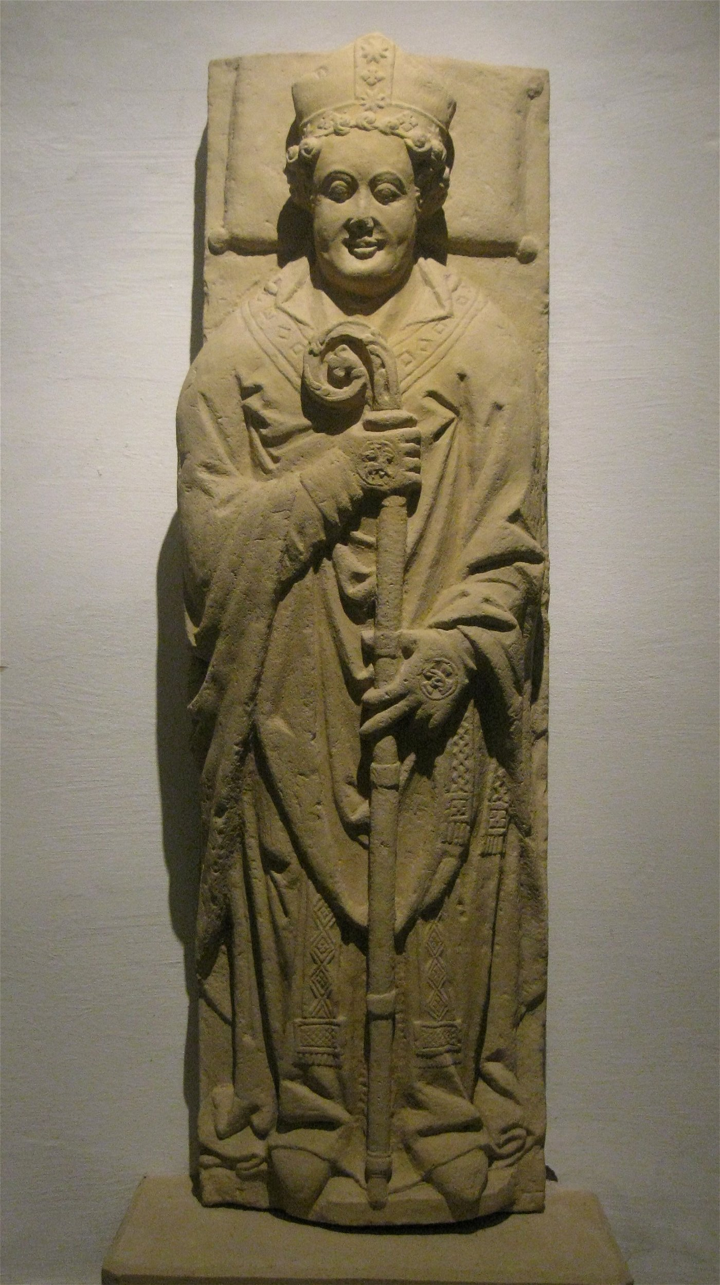 Grabplatte Bischof Meinwerk in der Krypta der Abdinghofkirche, Paderborn